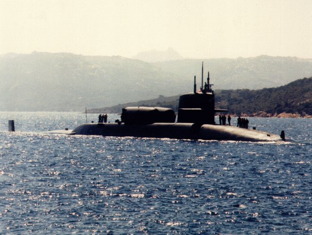 USS James K. Polk (SSN-645), circa mid-late 90's